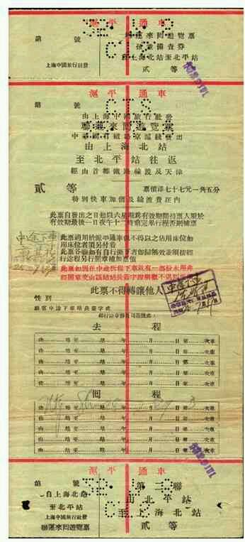 津浦铁路和南京铁路轮渡开通后，上海-北京之间得以开行有卧铺的直达旅客列车。这张车票由中华民国铁道部和中国旅行社发行于20世纪30年代，两面各用中文和英文印刷。